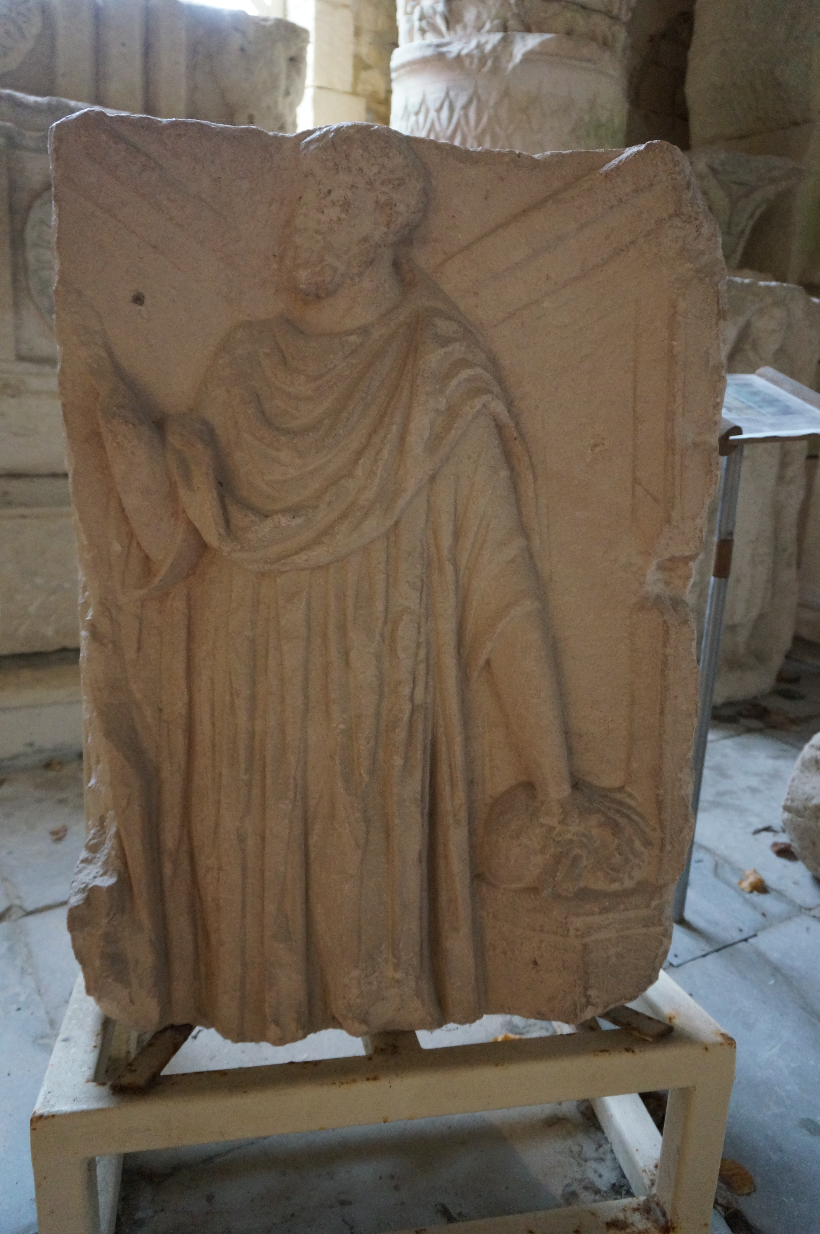 sculpture présentée au musée.